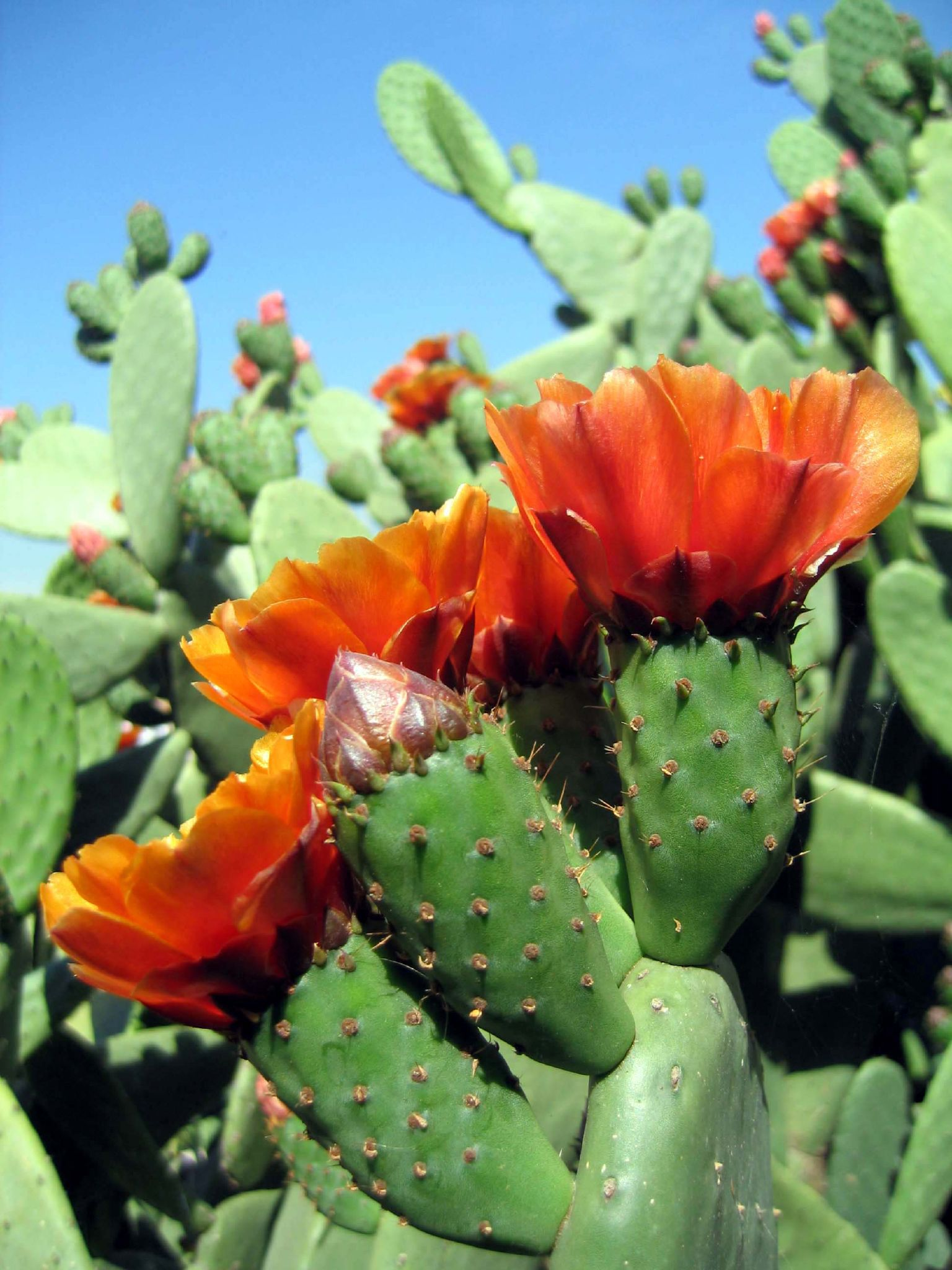 Opuntia